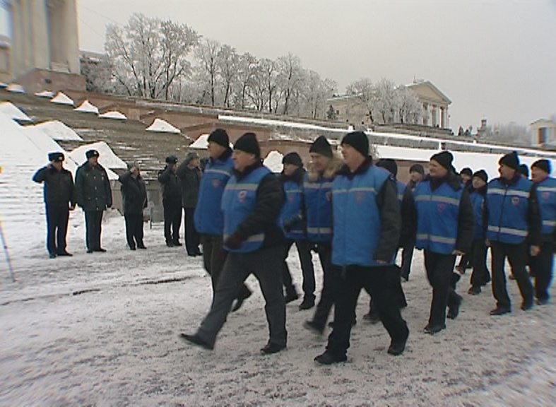 К охране общественного порядка в Волгограде привлечены казаки и дружинники